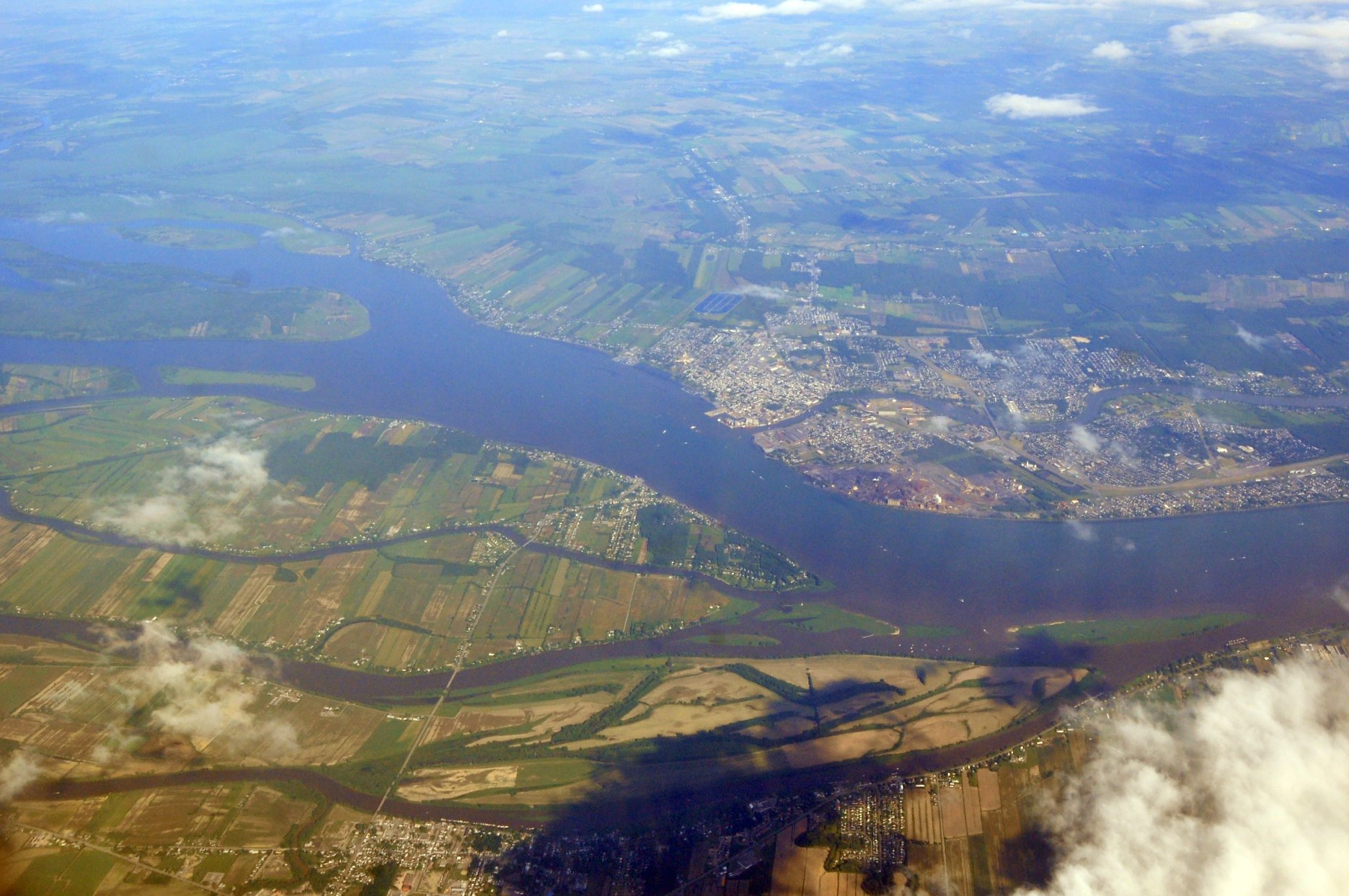 Le Saint-Laurent près de Sorel-Tracy, Québec